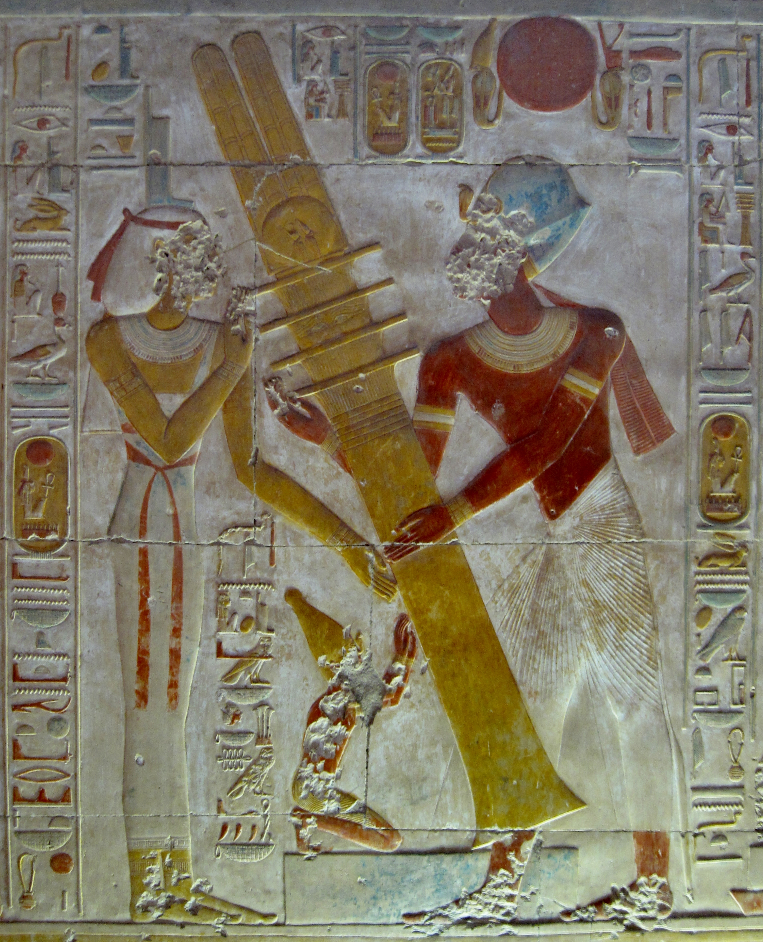 Relief des Aufstellens des Djed-Pfeilers durch König Sethos I. vor der Göttin Isis an der Südwestwand in der ersten Halle des Osiris-Komplexes im Totentempel des Sethos I. von Abydos, Ägypten